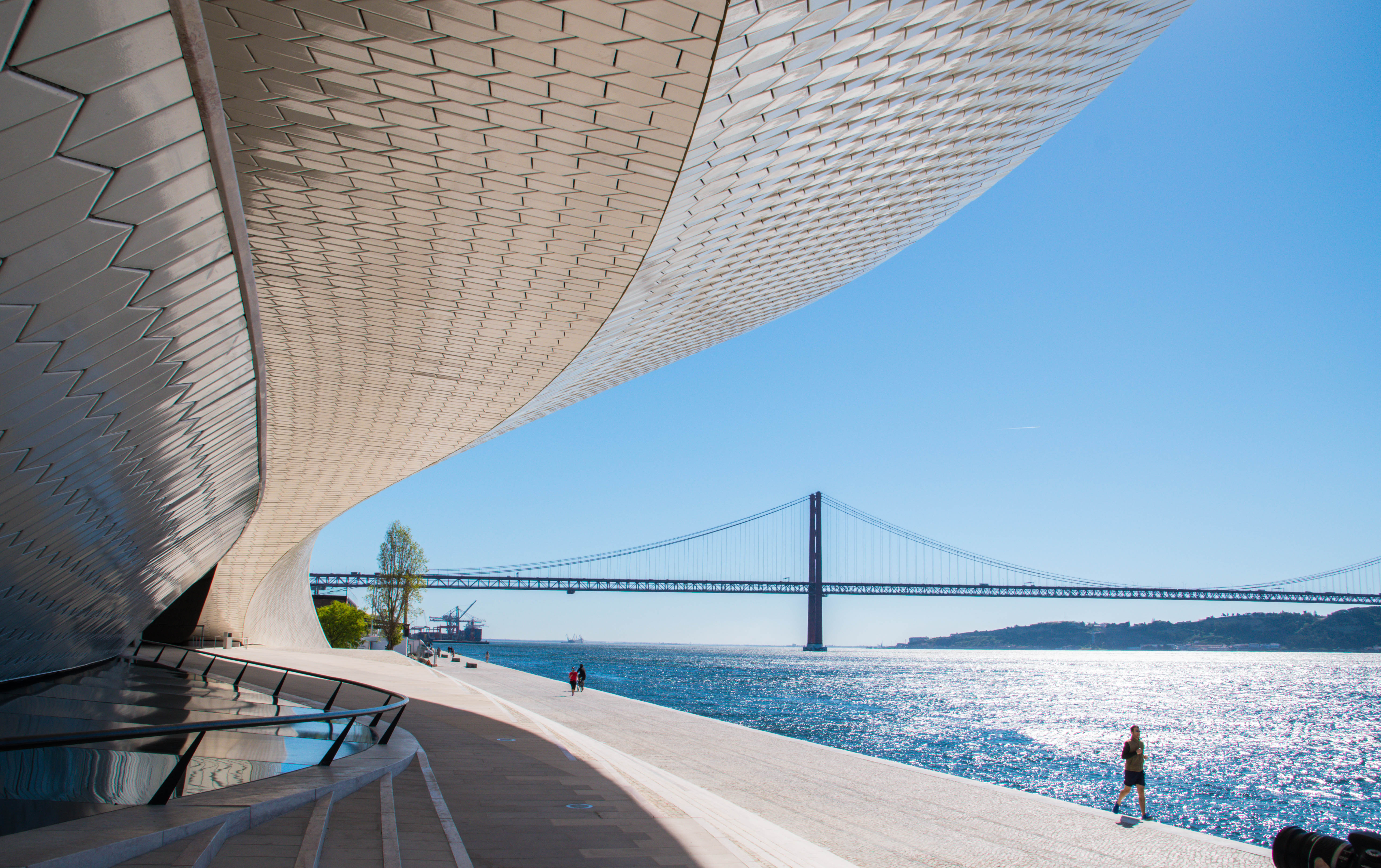 Lisbon, Portugal